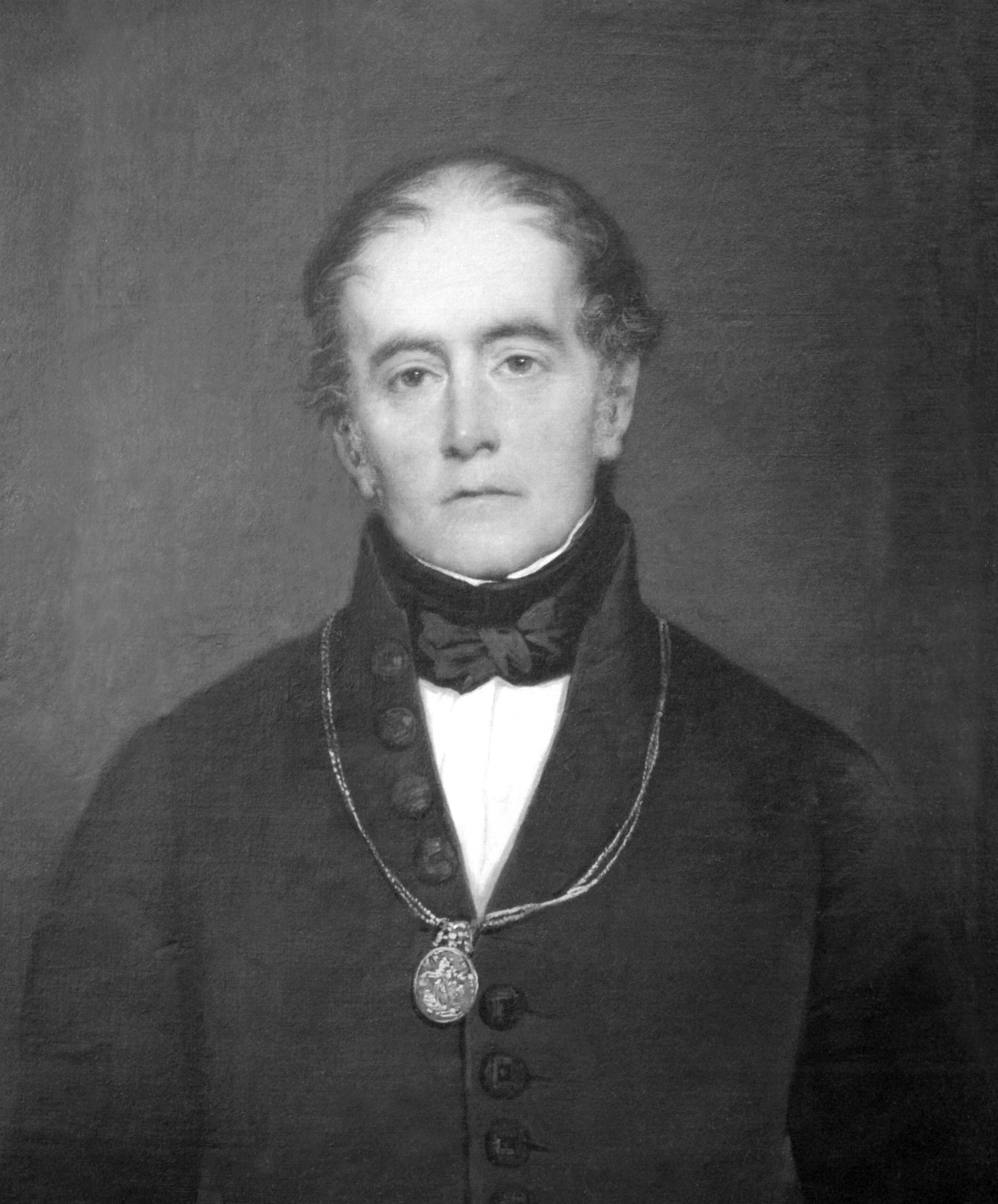 Reproducción en blanco y negro del retrato del venezolano Andrés Bello realizado en Chile, país donde vivió desde 1829 (se le concedió la nacionalidad chilena en 1832) hasta su muerte, acaecida en 1865